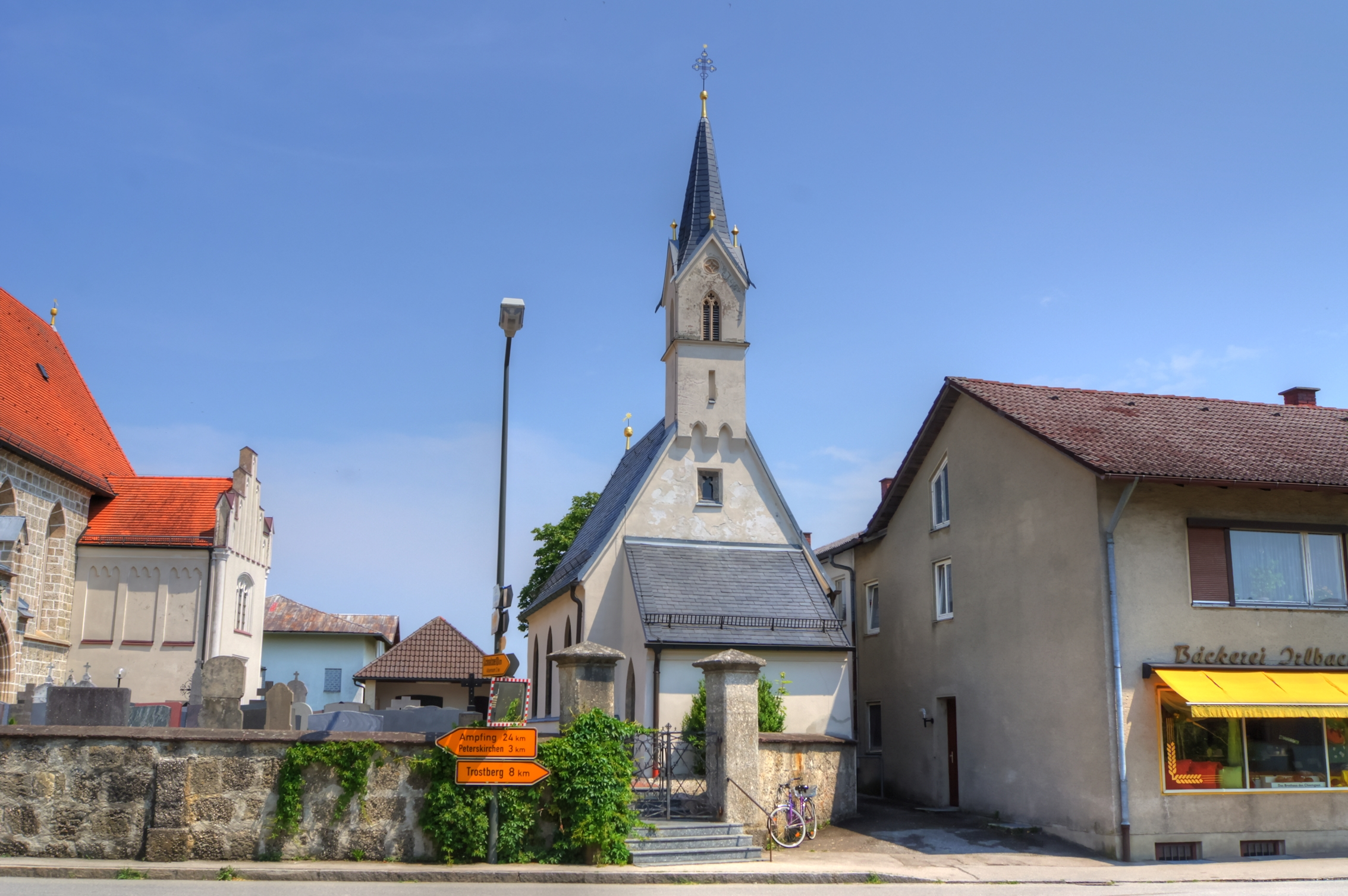 neugotisch, Ende 19. Jahrhundert; mit Ausstattung.This is a photograph of an architectural monument.